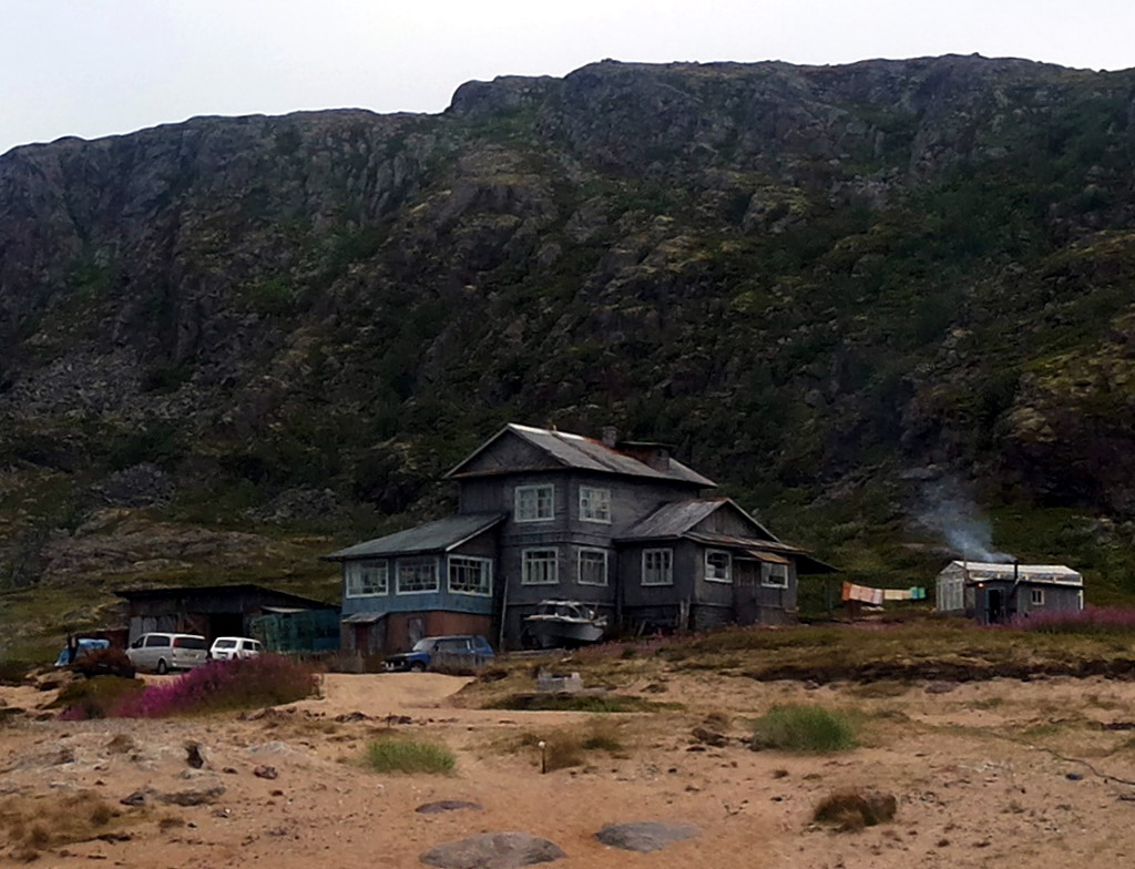 Дом Николая Сергеева. Декорации к фильму "Левиафан".